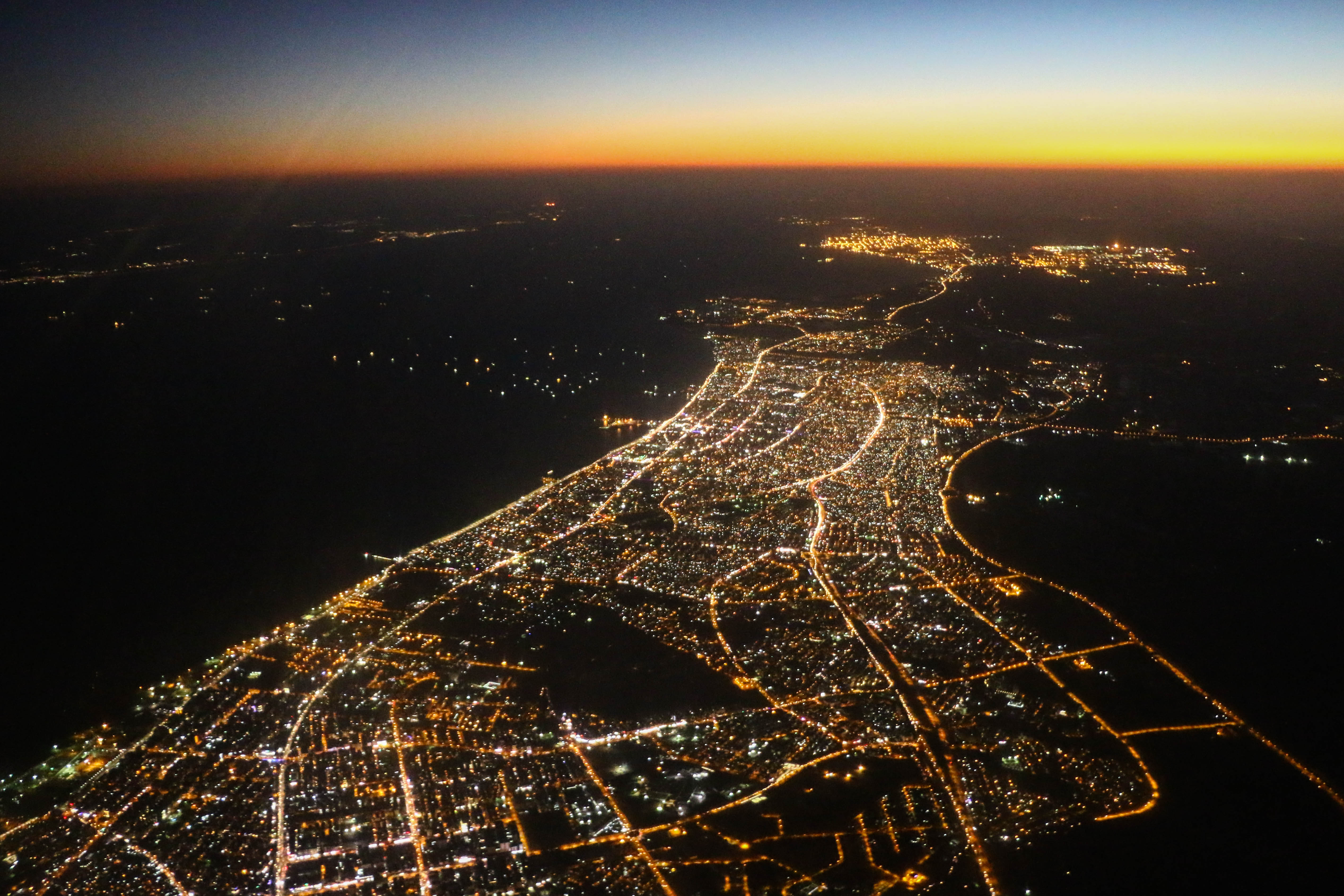 تصویری از غروب بندرعباس - عکس از محمدامین نوبهار